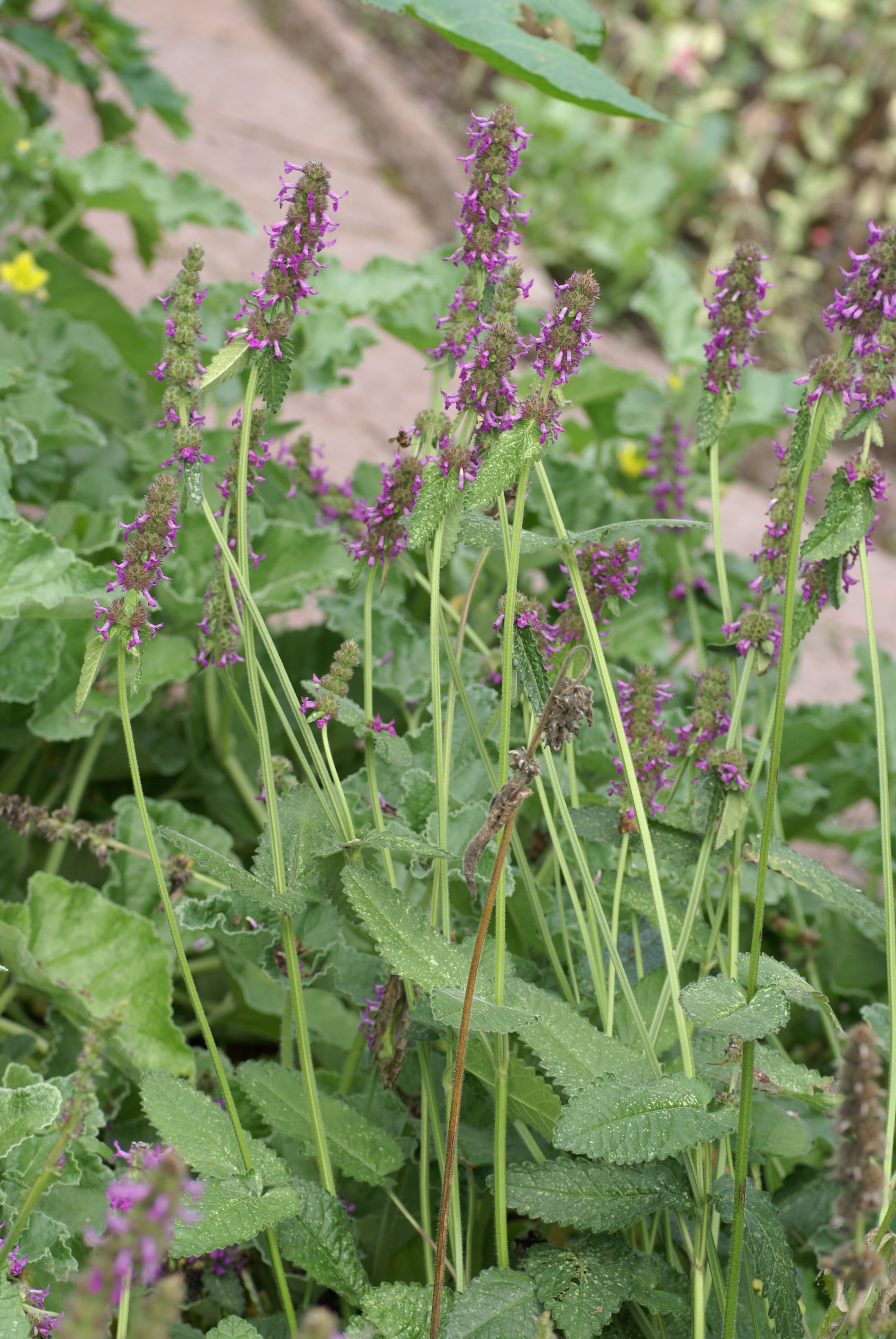 Plant species Stachys officinalis, shot in Bergianska trädgården, northern Stockholm.